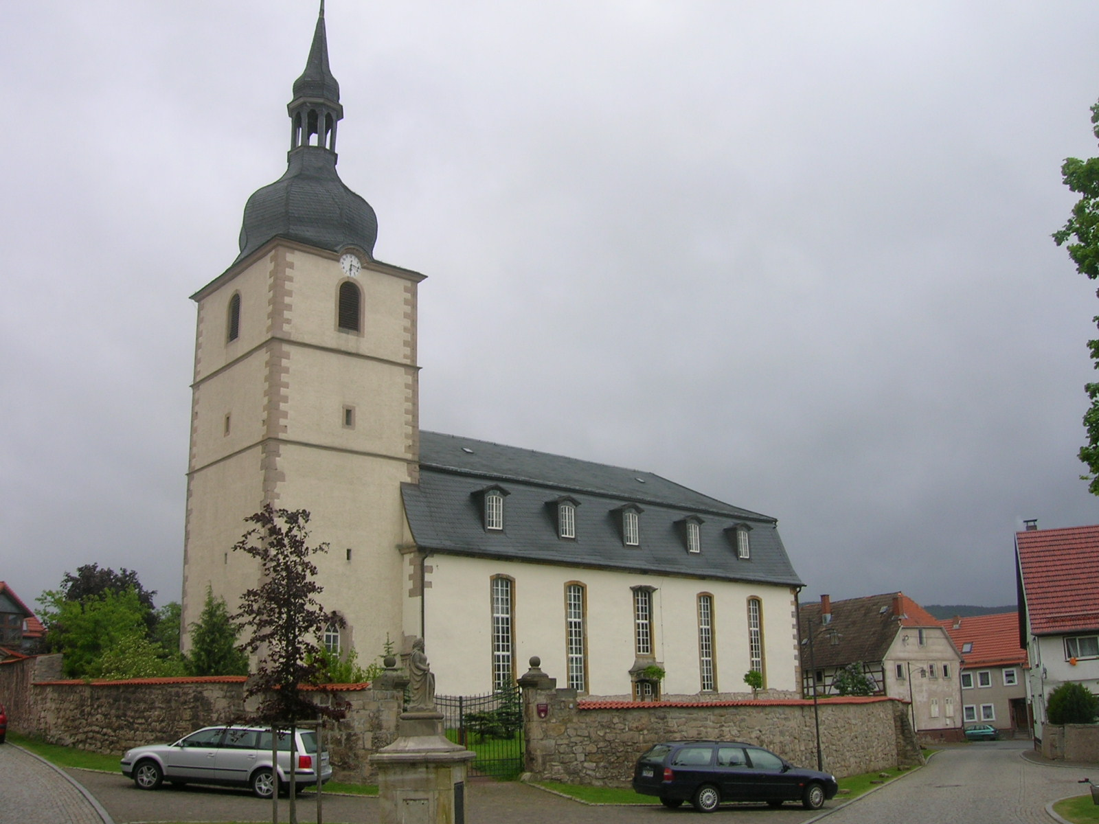 Crawinkel, Dorfkirche